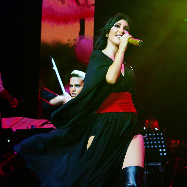 Hande Yener, Harbiye Konserinde "Biri Var"ı seslendirirken.